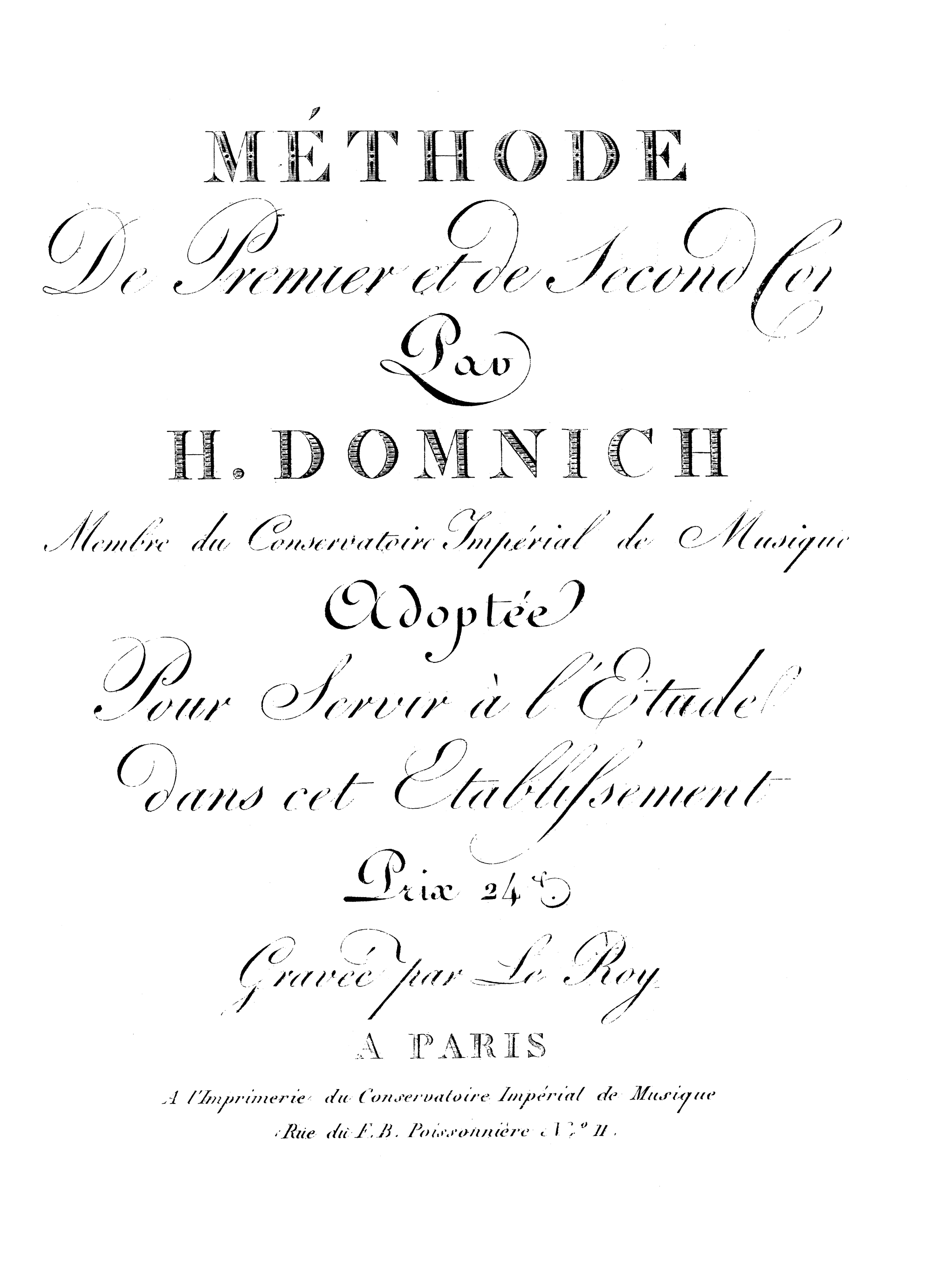 Methode de premier et de second cor : par H. Domnich, membre de Conservatoire Imperial de Musique : adoptée pour servir à l'etude dans cet etablissement. Gravée par Le Roy a Paris.